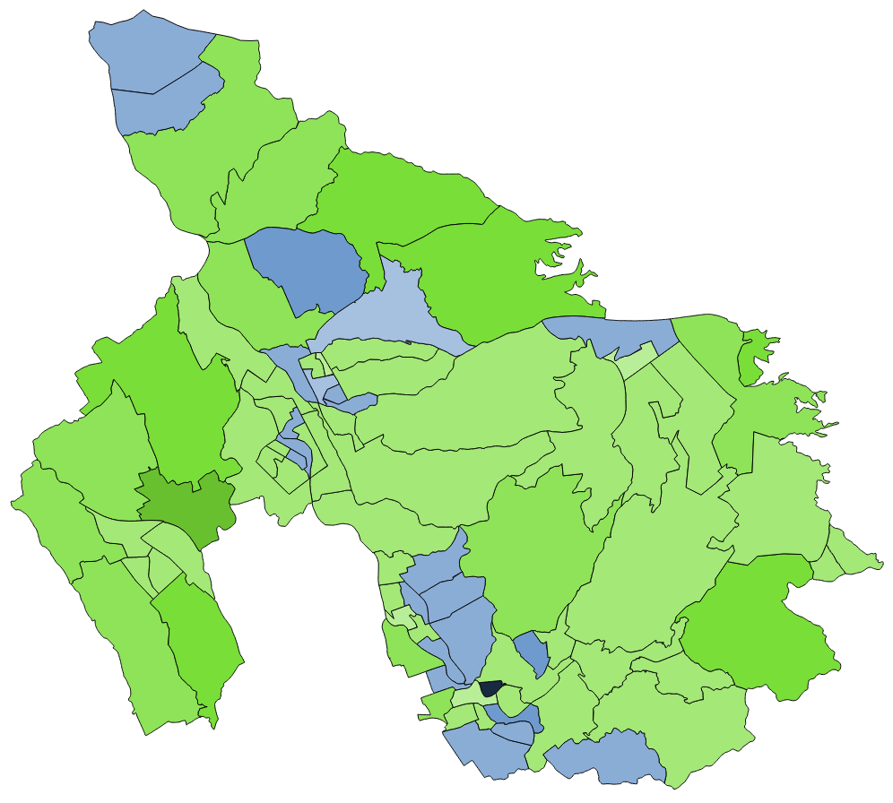 中文（台灣）: 顏色對照表